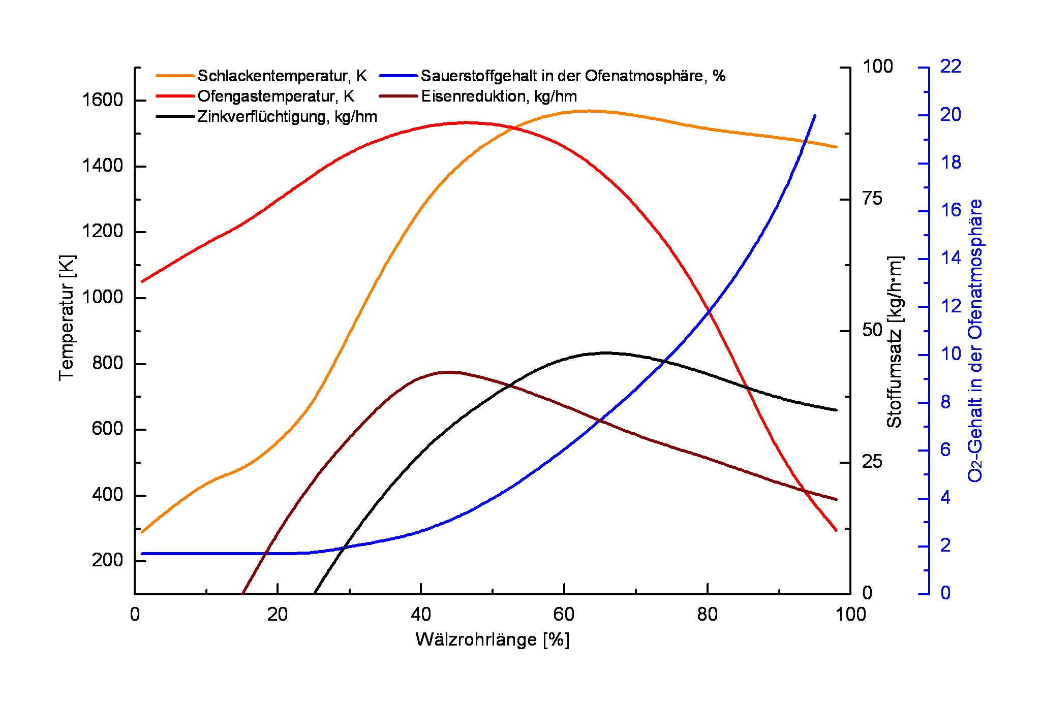 Verlaeufe im Waelzrohr